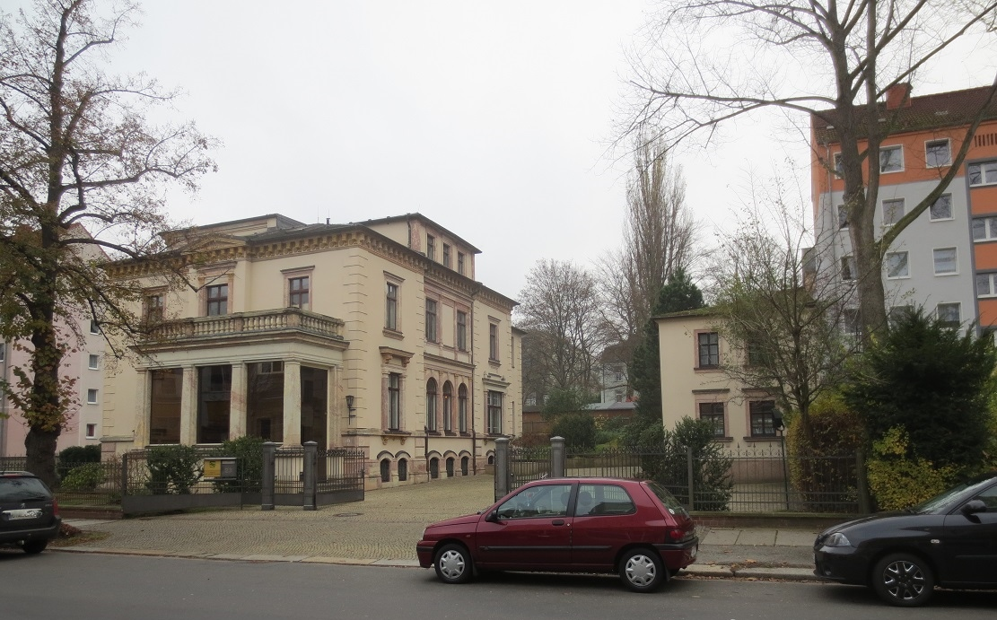 Kulturdenkmal, Villa mit Nebengebäude in Chemnitz-Kappellenberg